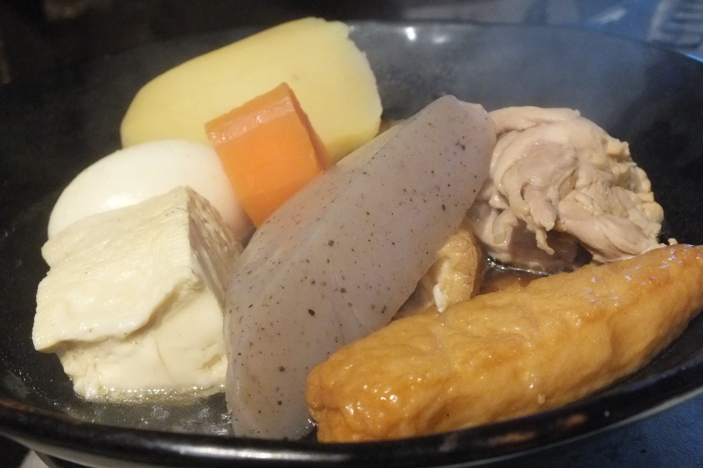 Oden-おでん・関東煮